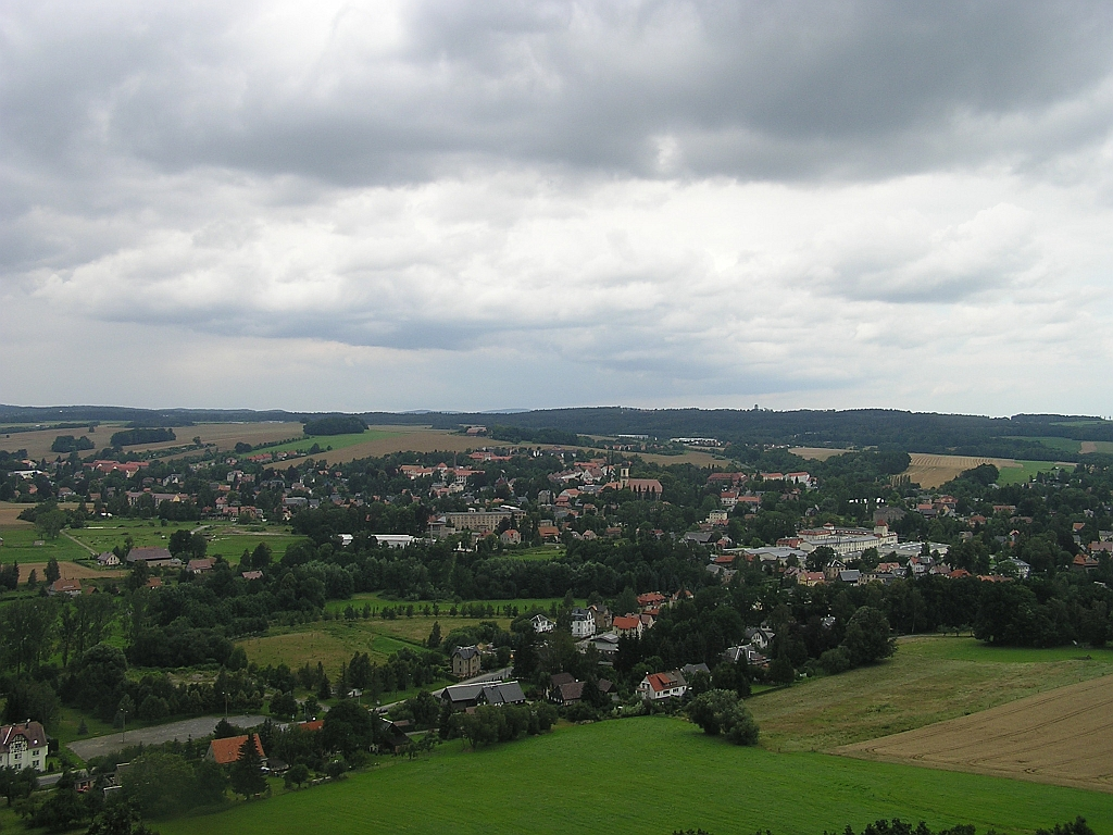 Seifhennersdorf from Burgsberg, Seifhennersdorf, 02782, Sachsen, Deutschland